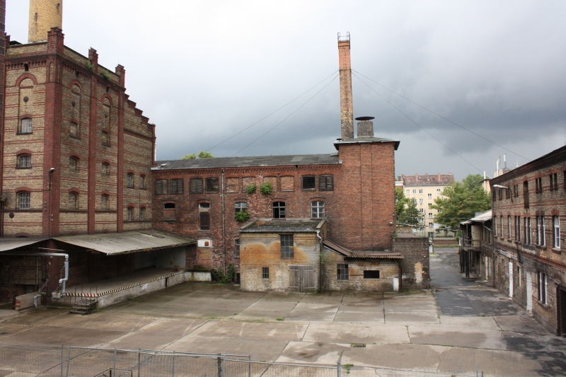 Ehem. Flohmarkt am Eschengraben. Der Komplex steht seit 1995 unter Denkmalschutz